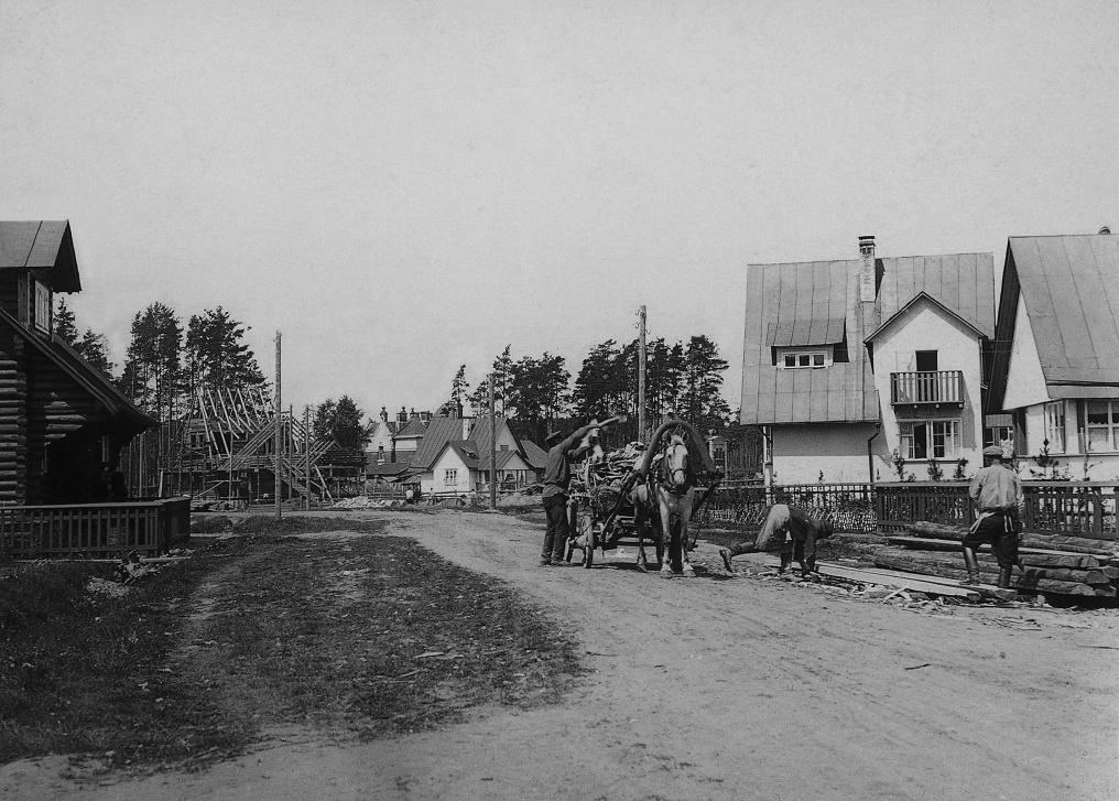 Посёлок "Сокол" в Москве. Улица Сурикова.